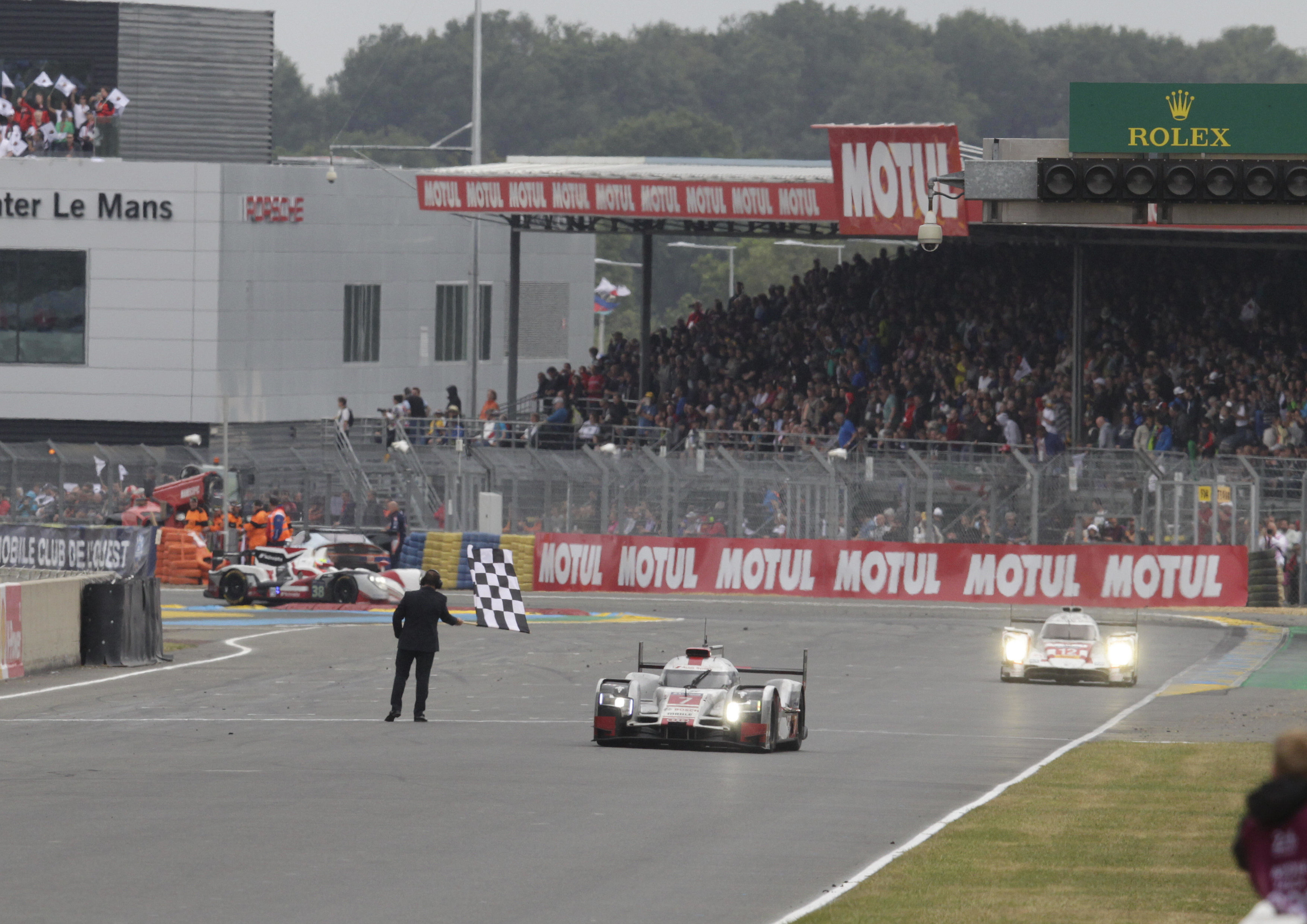 Audi R18 e-tron quattro #7 (Audi Sport Team Joest), André Lotterer, Marcel Fässler, Benoît Tréluyer